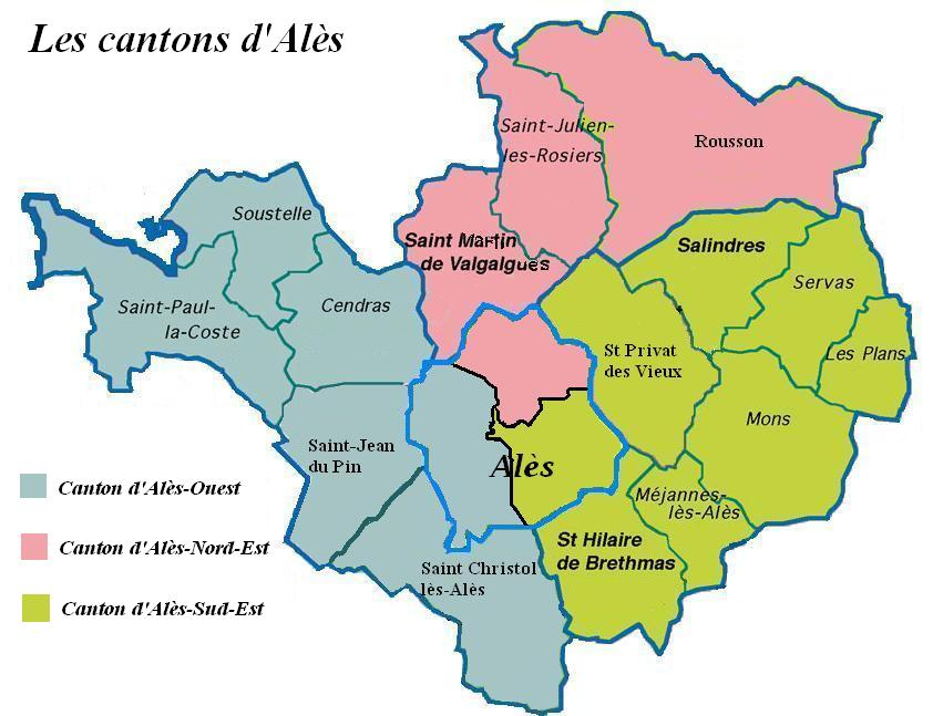 Les Canton d'Alès Illustration personnelle